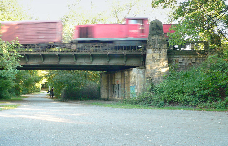 Bahnüberführung Güterumgehungsbahn Hannover zwischen Tiergarten und Hermann-Löns-Park